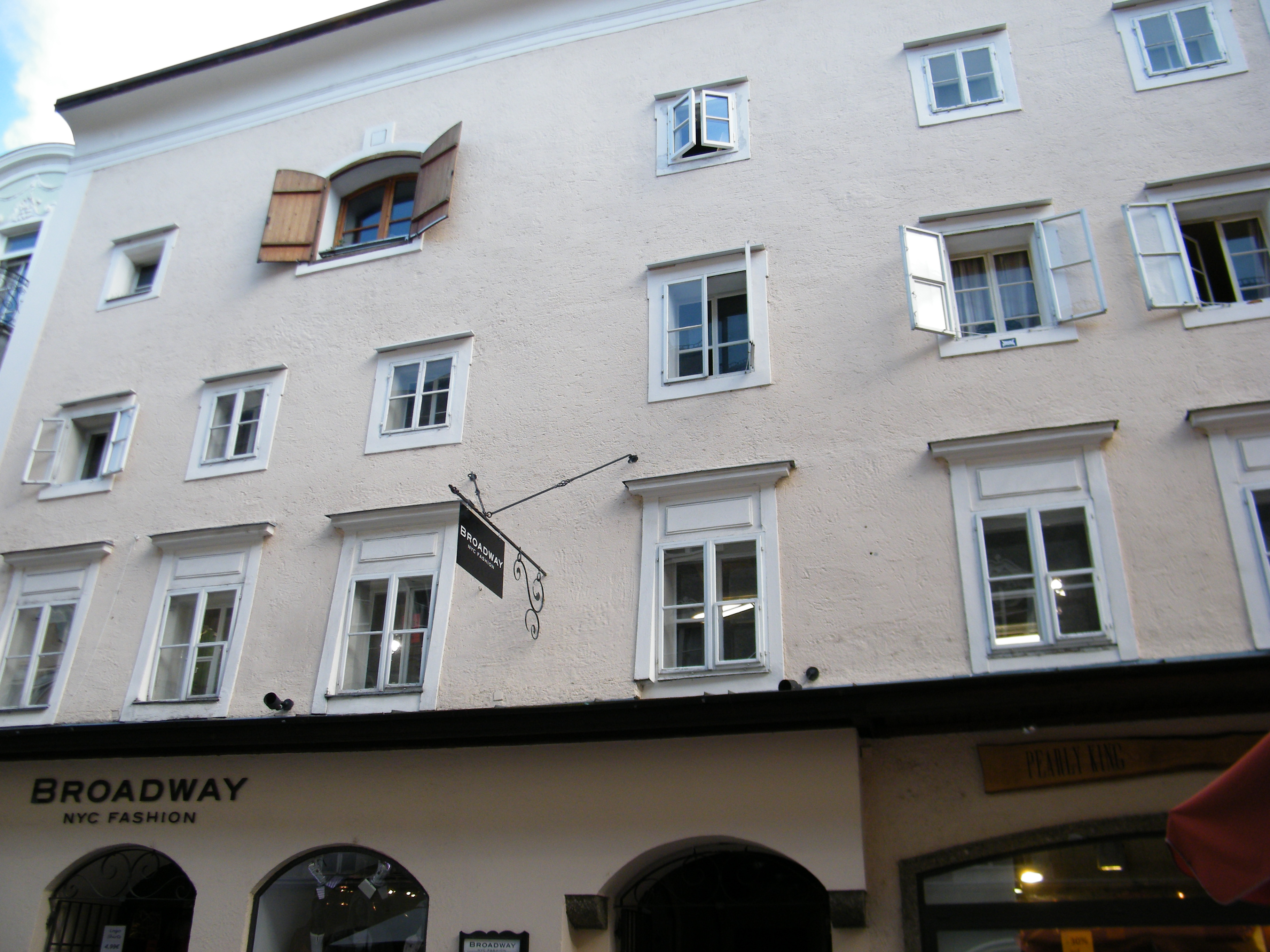 Lehenrößlerhaus